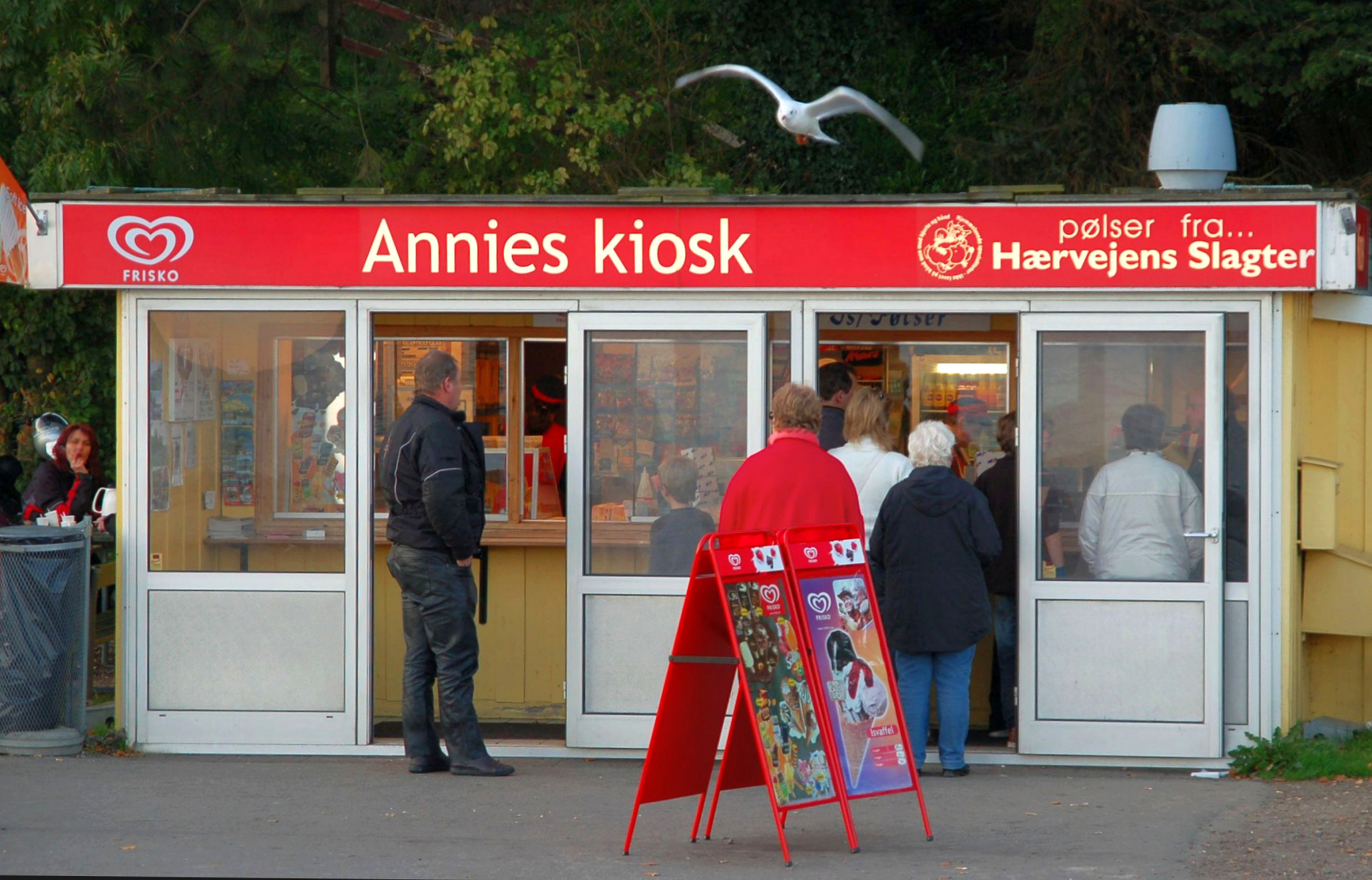 Hot Dog shop in Sønderhav, Denmark